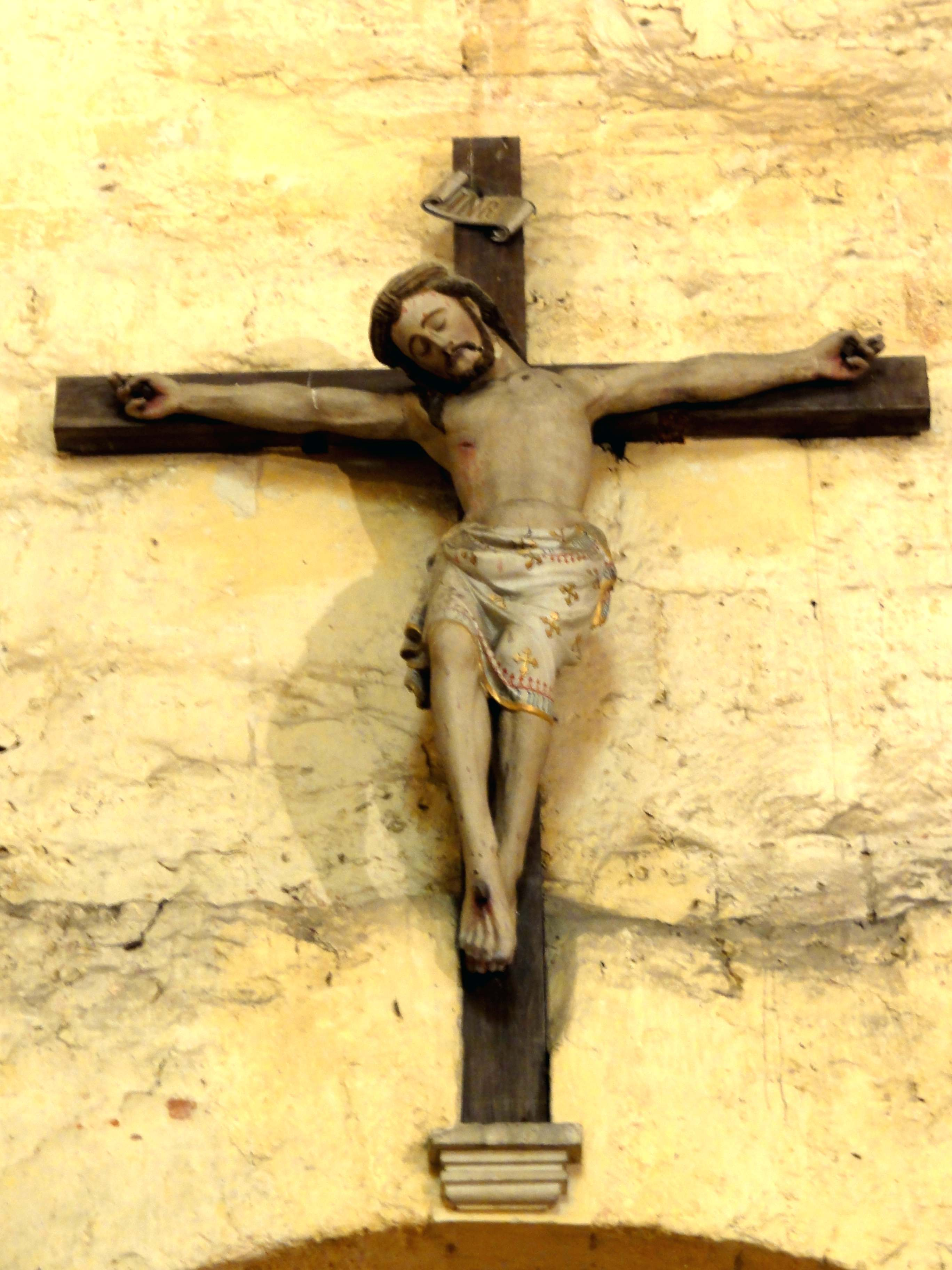 Mobilier de l'église (voir titre).